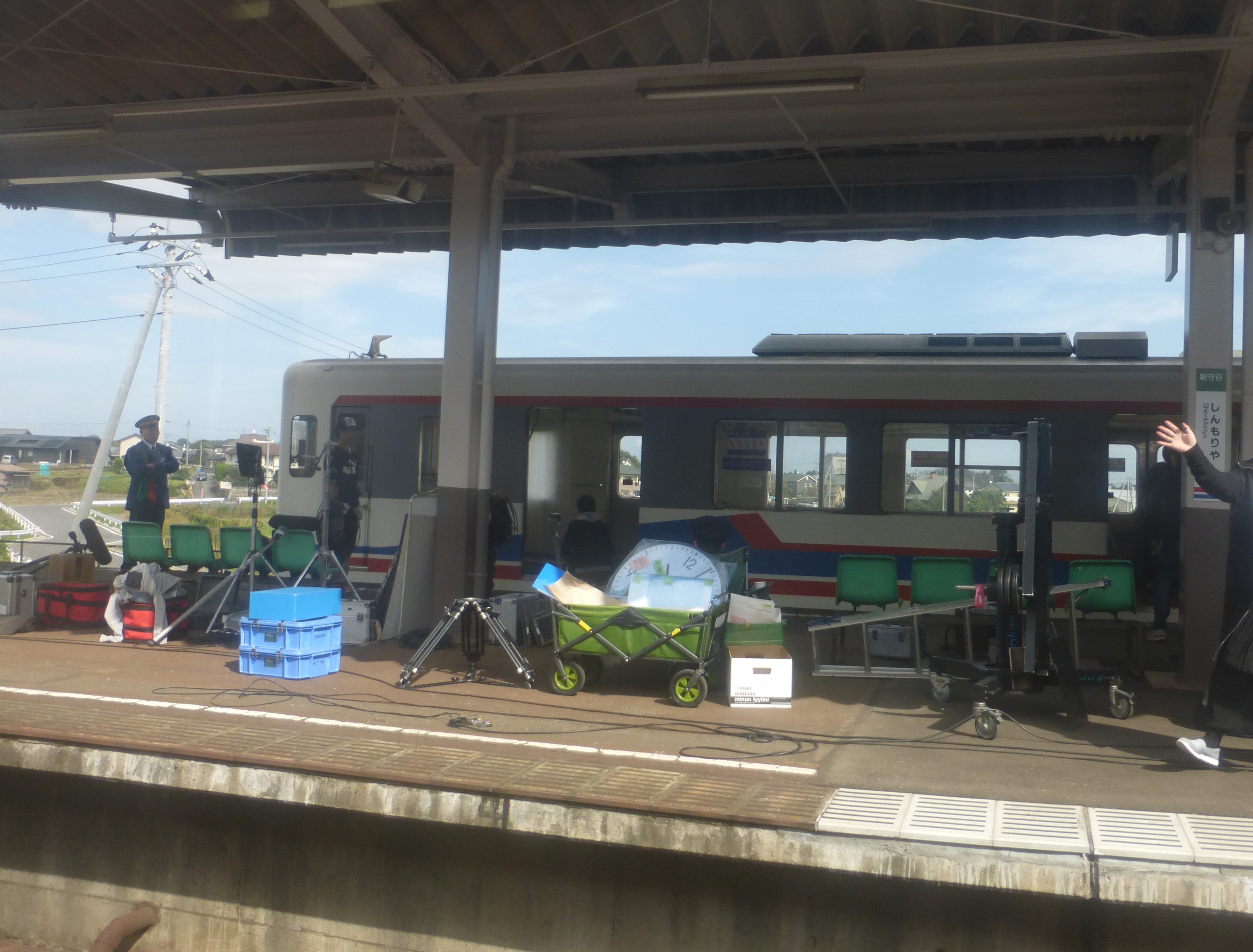 君に捧げるエンブレム撮影風景